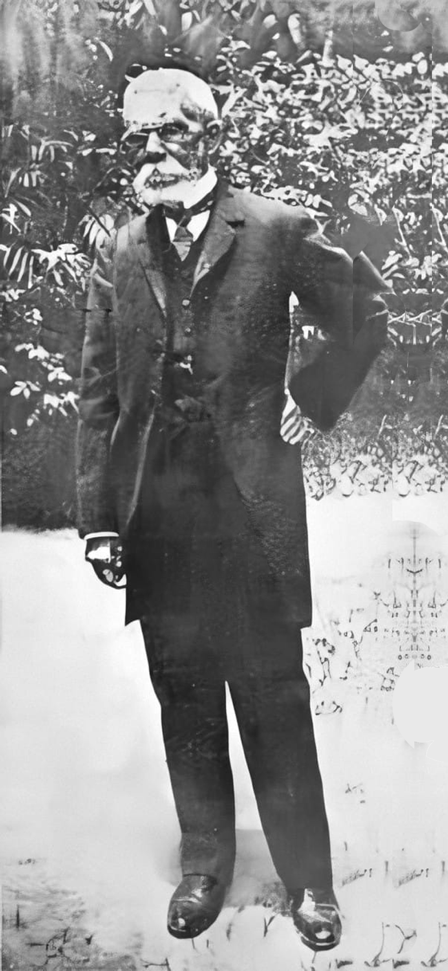 O escritor Machado de Assis em possivelmente sua última foto. Brazilian writer Machado de Assis in perhaps his last photo.